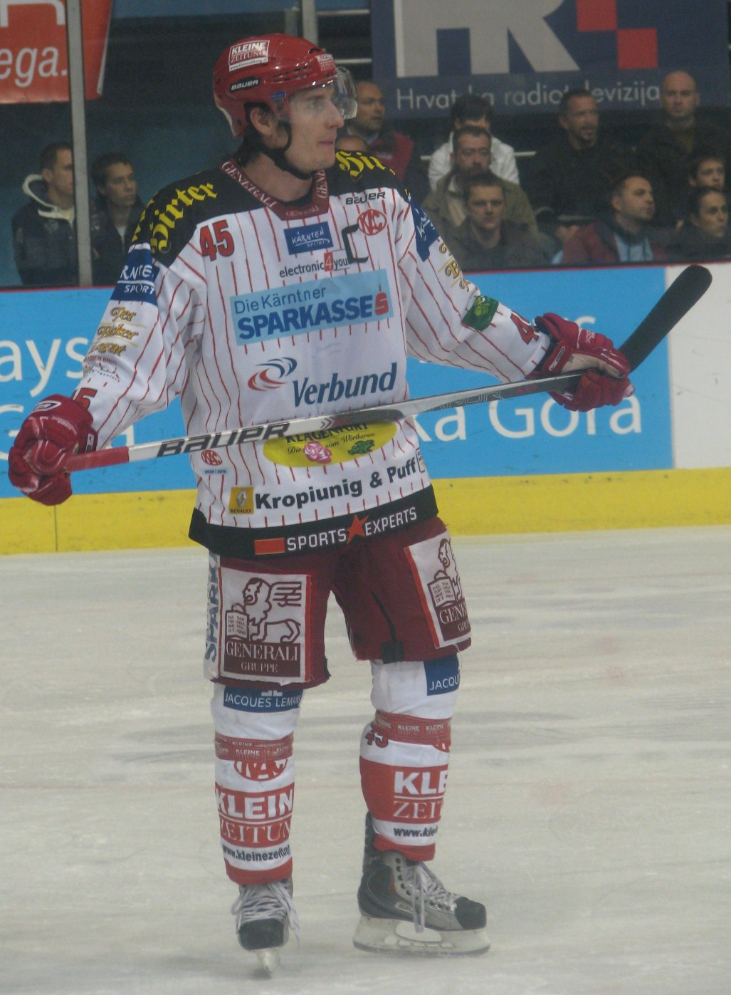 David Schuller 301009.jpg